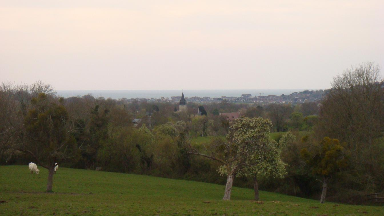 mer et campagne de blonville+ eglise